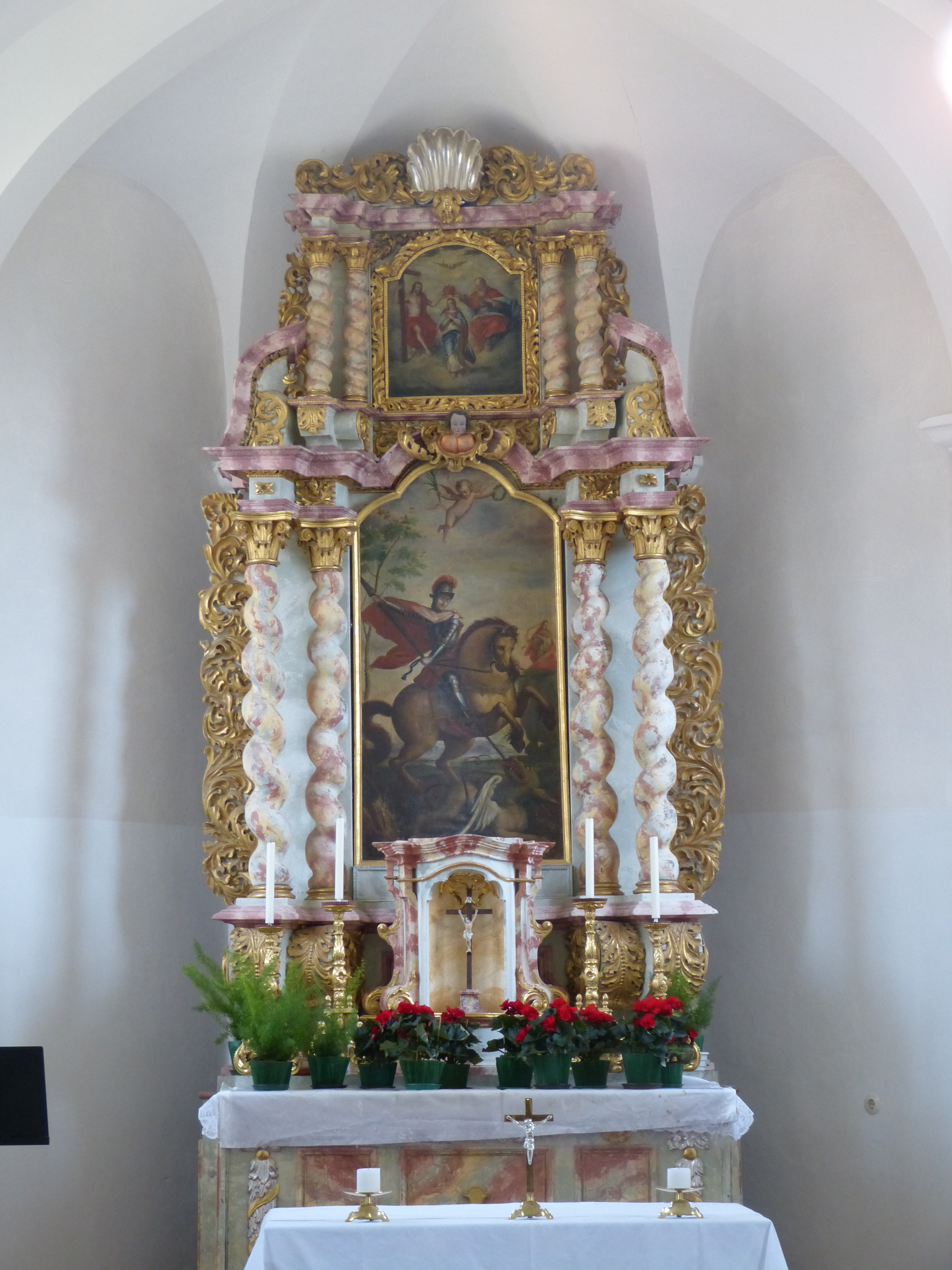 St. Georg, Mittelrieden, Landkreis Unterallgäu, Bayern